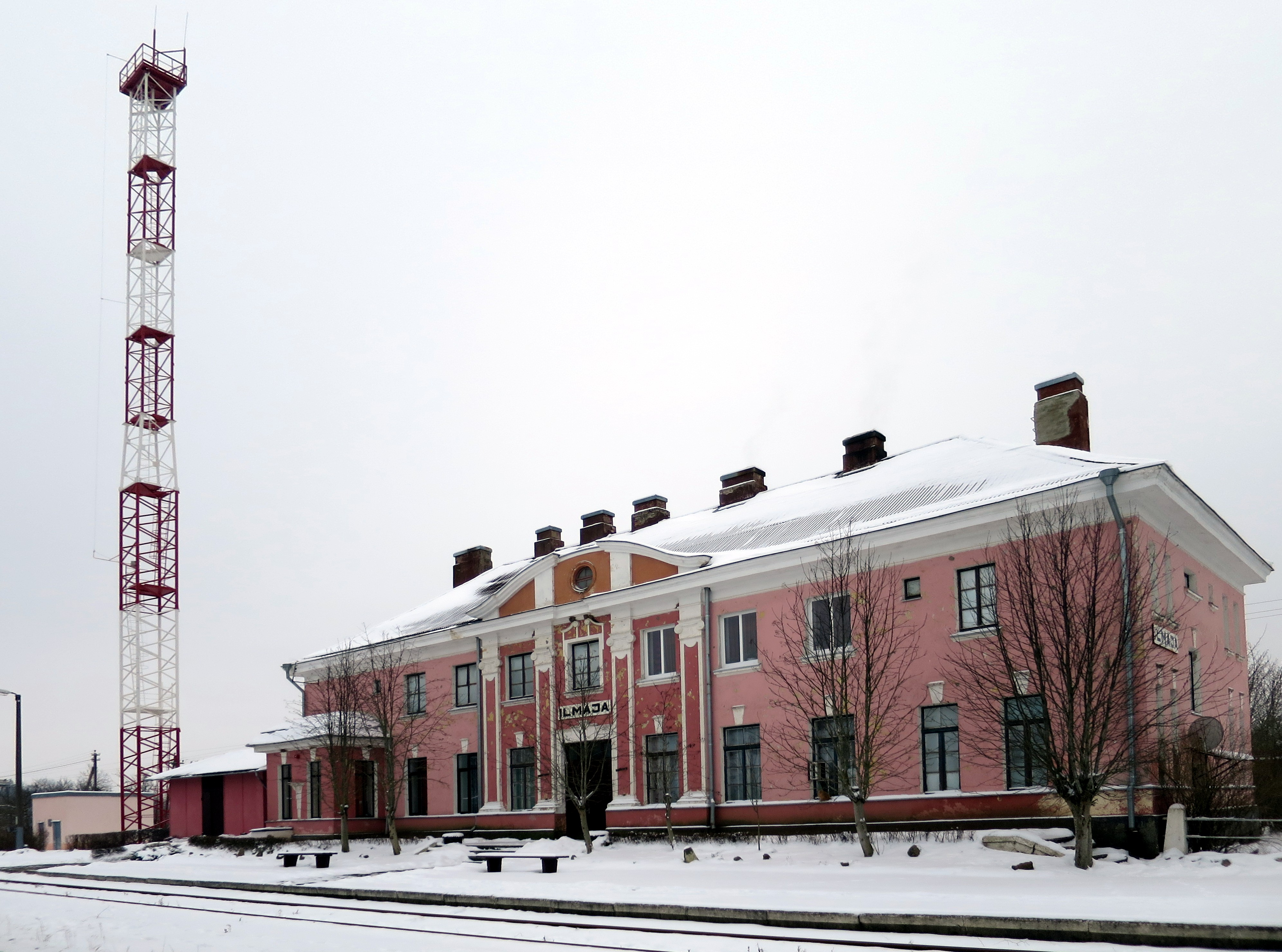 Ilmājas stacija